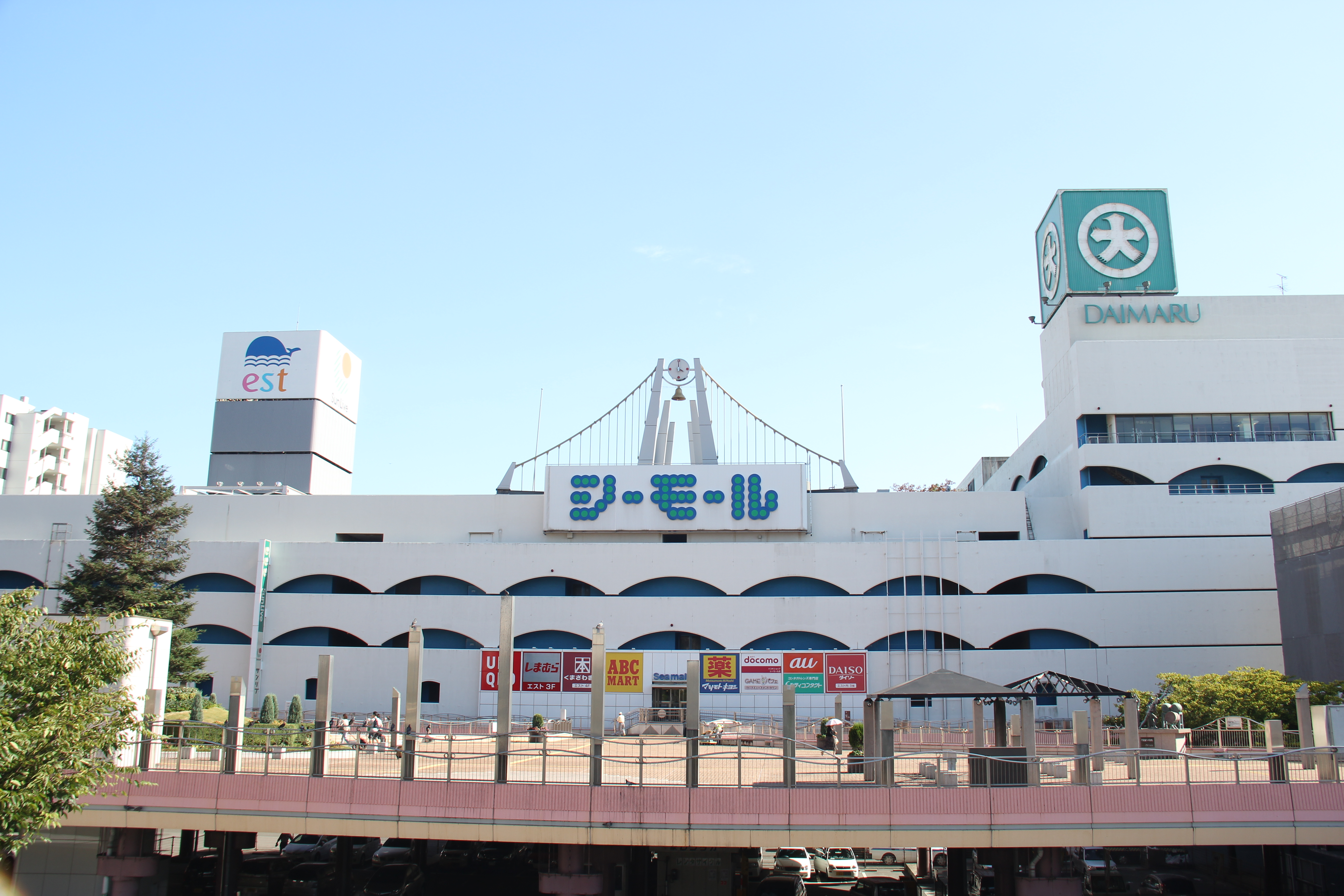 シーモール下関 シーモールest入居時代 Canon EOS 60D